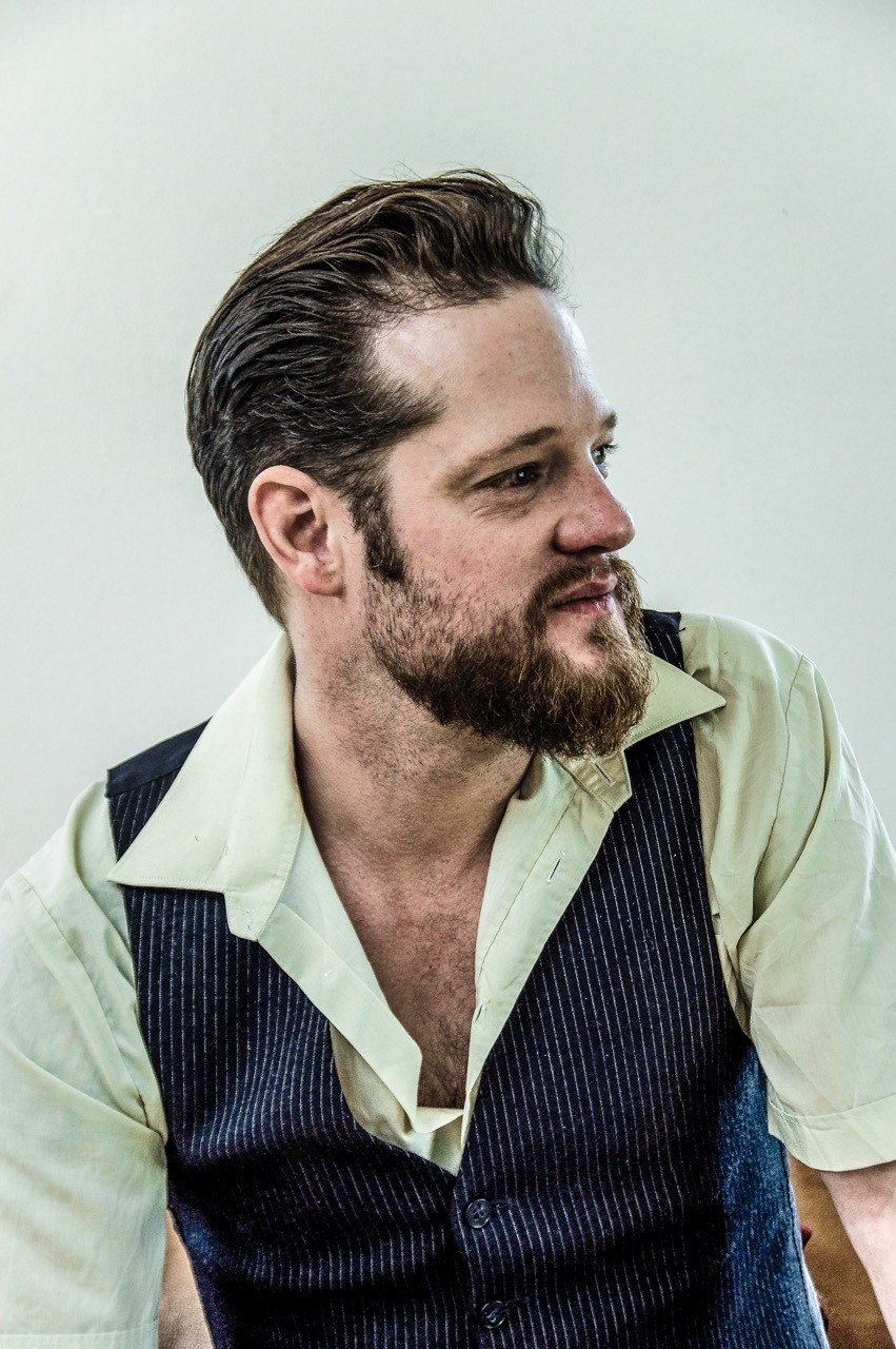 Deutscher Theater- und Filmschauspieler